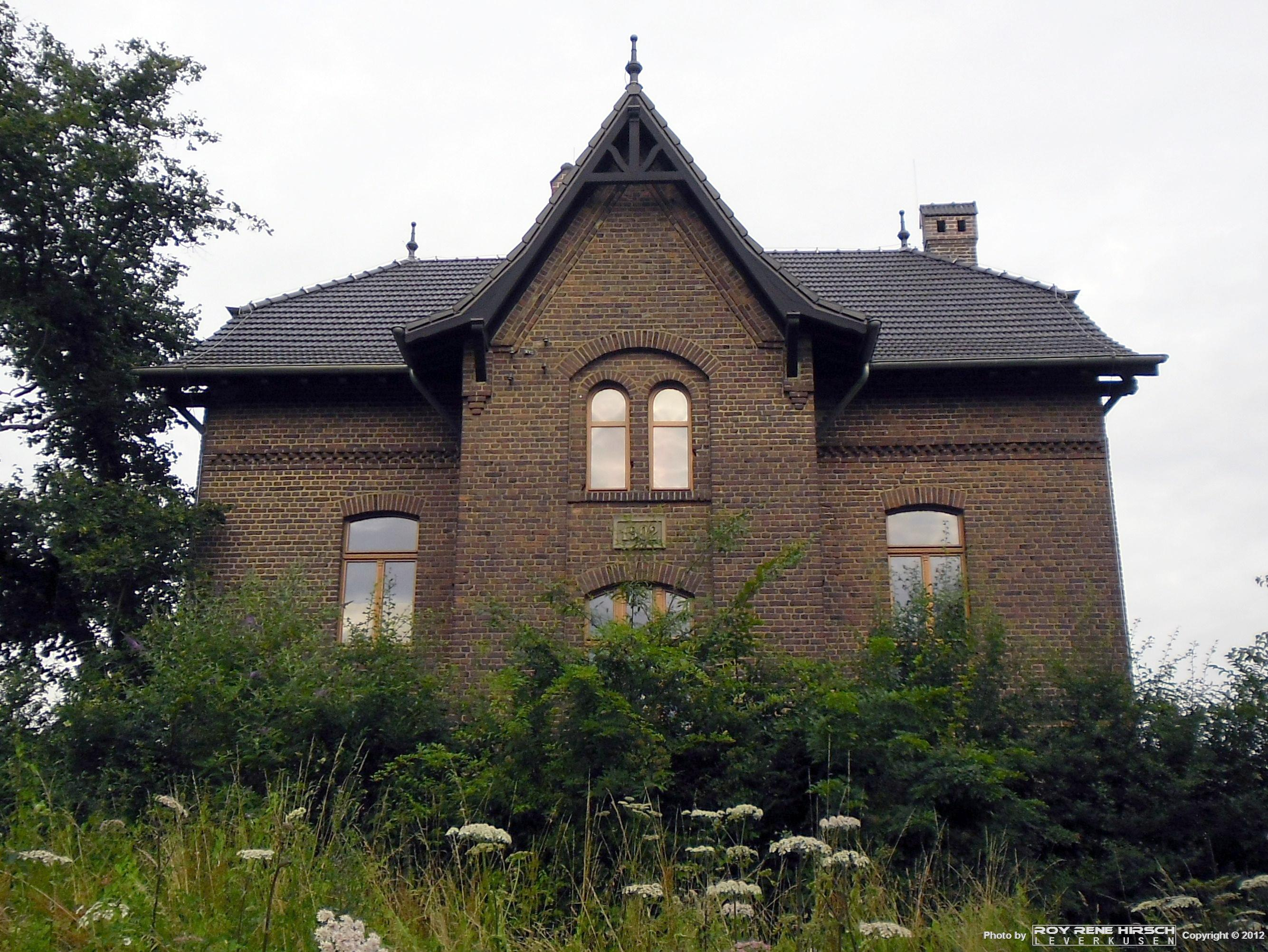 Baudenkmal: Leverkusen-Manfort, Hemmelrather Hof.